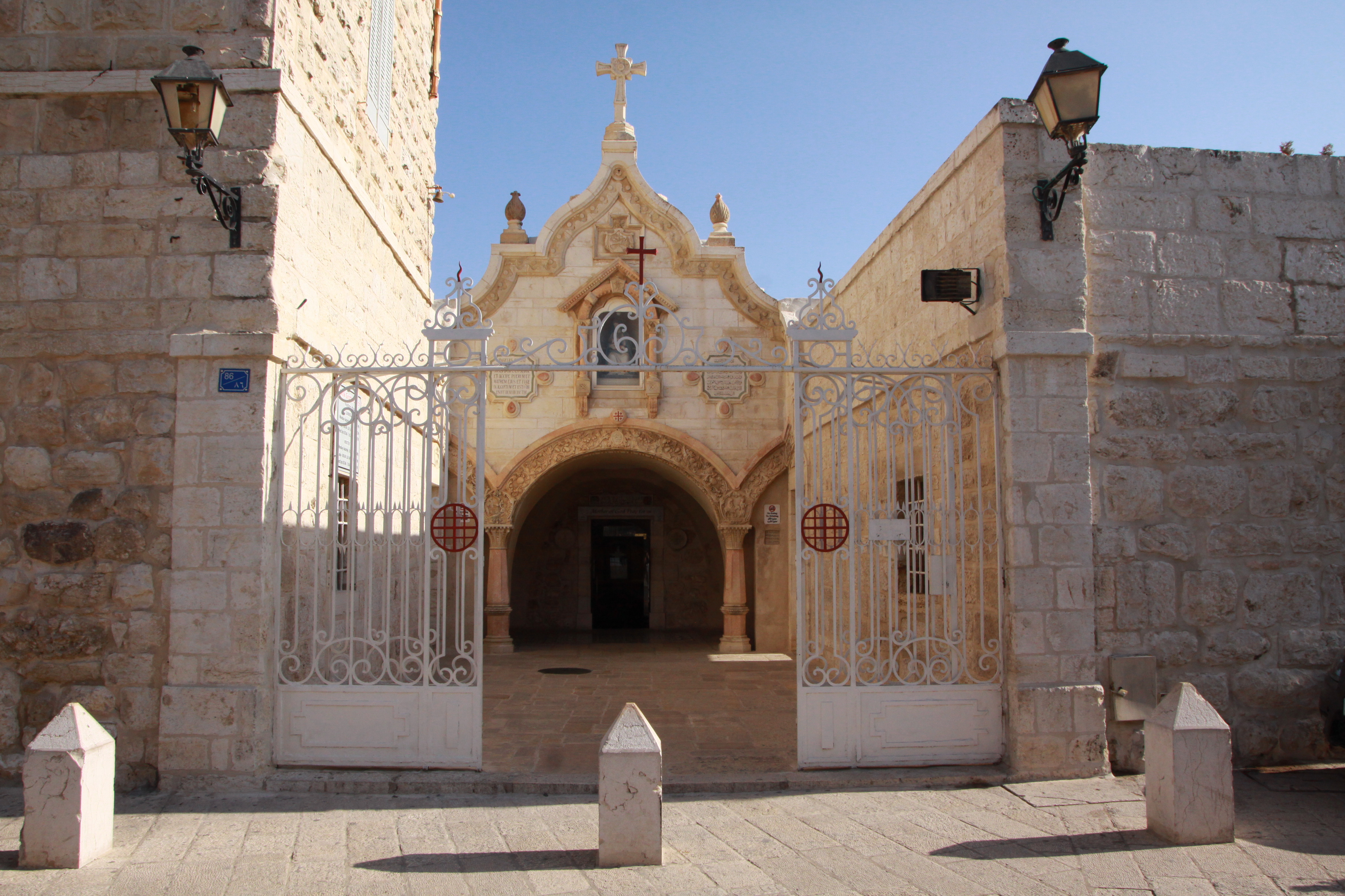 Vchod do Mléčné jeskyně